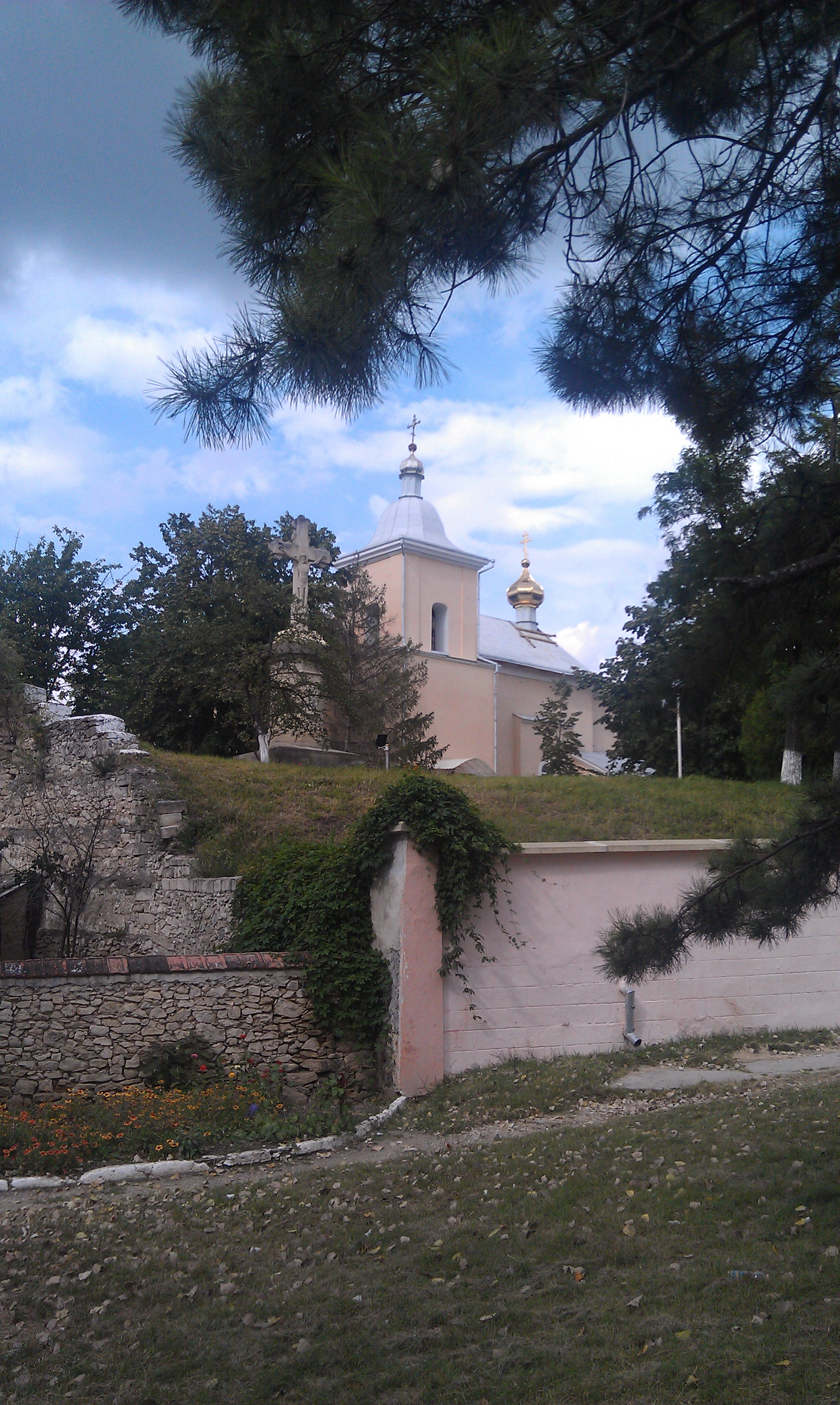 Православная церковь Св. Димитрия (1631—1636 г.г.) в г.. Оргеев